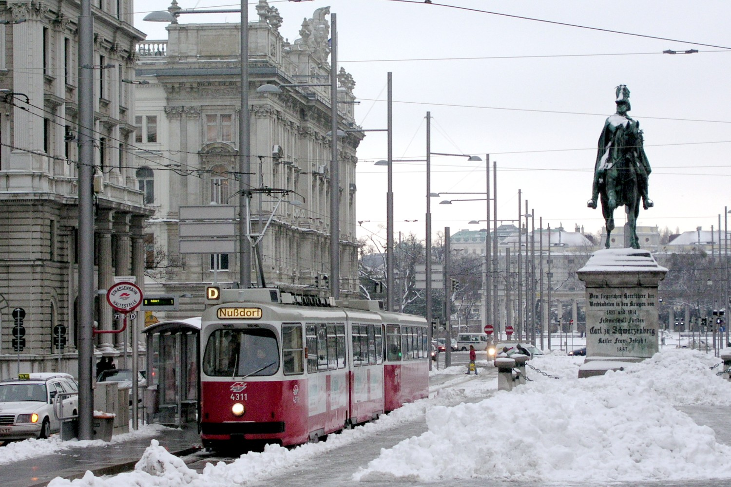 Tramcar type E2 with trailer c5 on line "D" on Schwarzenbergplatz - Triebwagen Type E2 mit Beiwagen c5 auf dem Schwarzenbergplatz own image, 16 February 2005 Photographer: Martin Ortner, Vienna, Austria